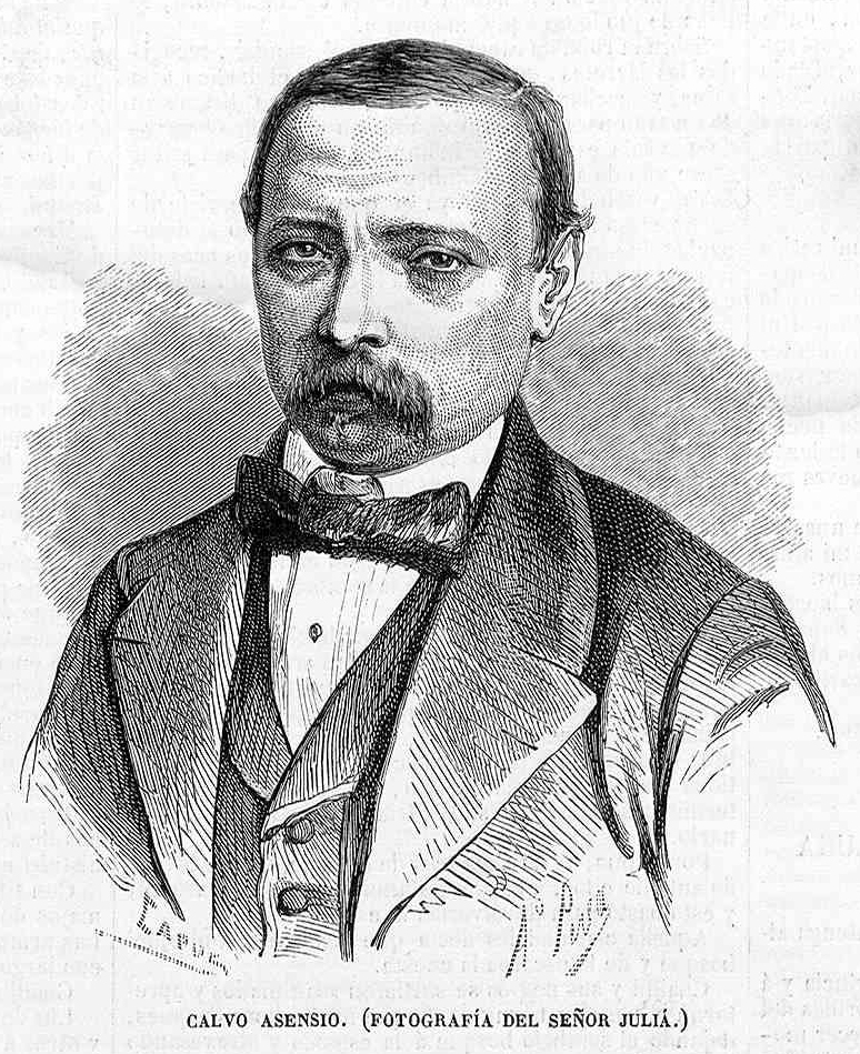 «Calvo Asensio (fotografía del señor Juliá)», en la revista española El Museo Universal.